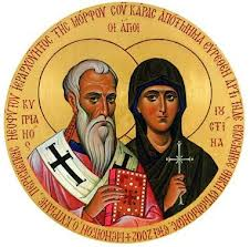 Ікона священомученика Кипріяна і мучениці Юстини